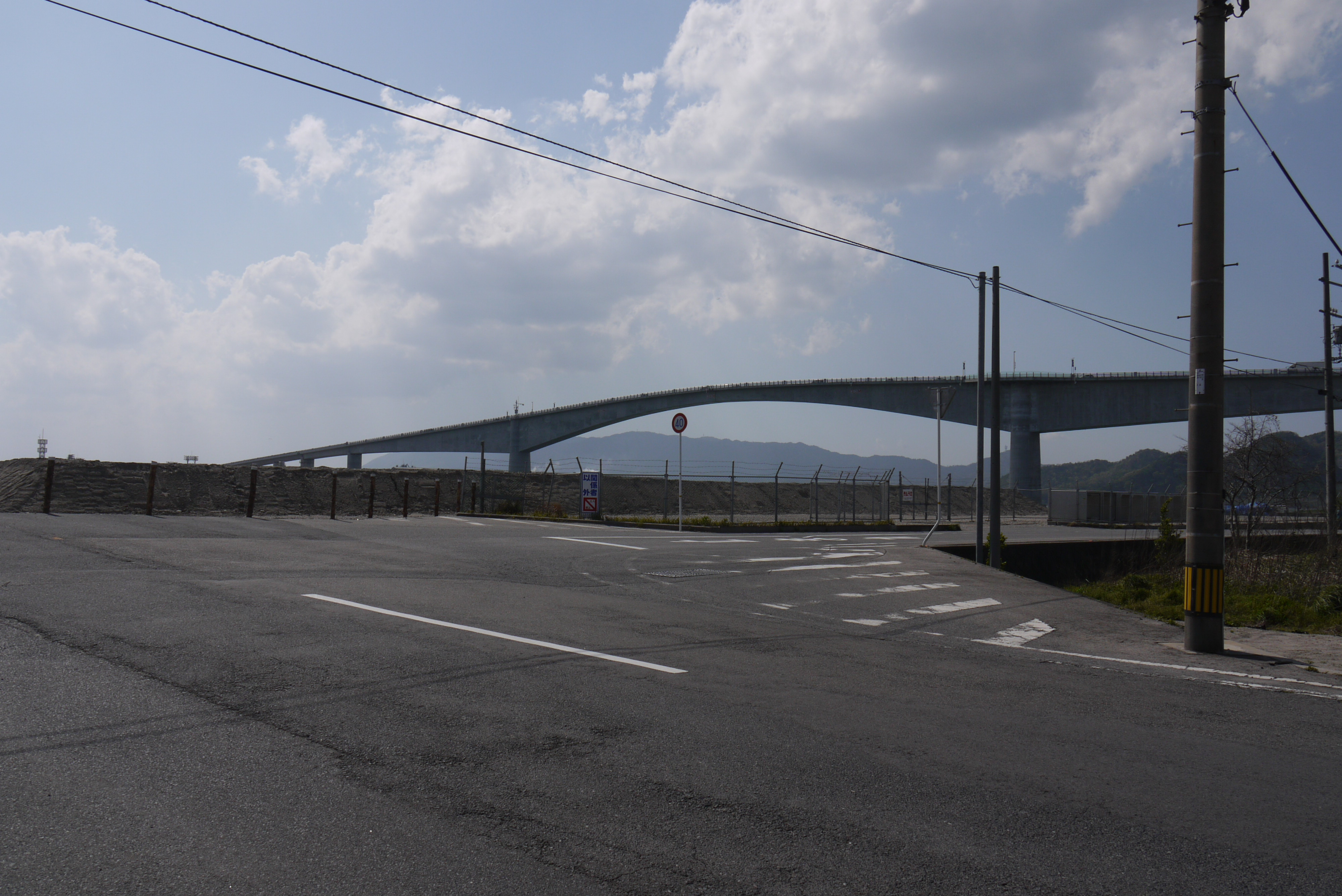 2010年4月30日の江島大橋